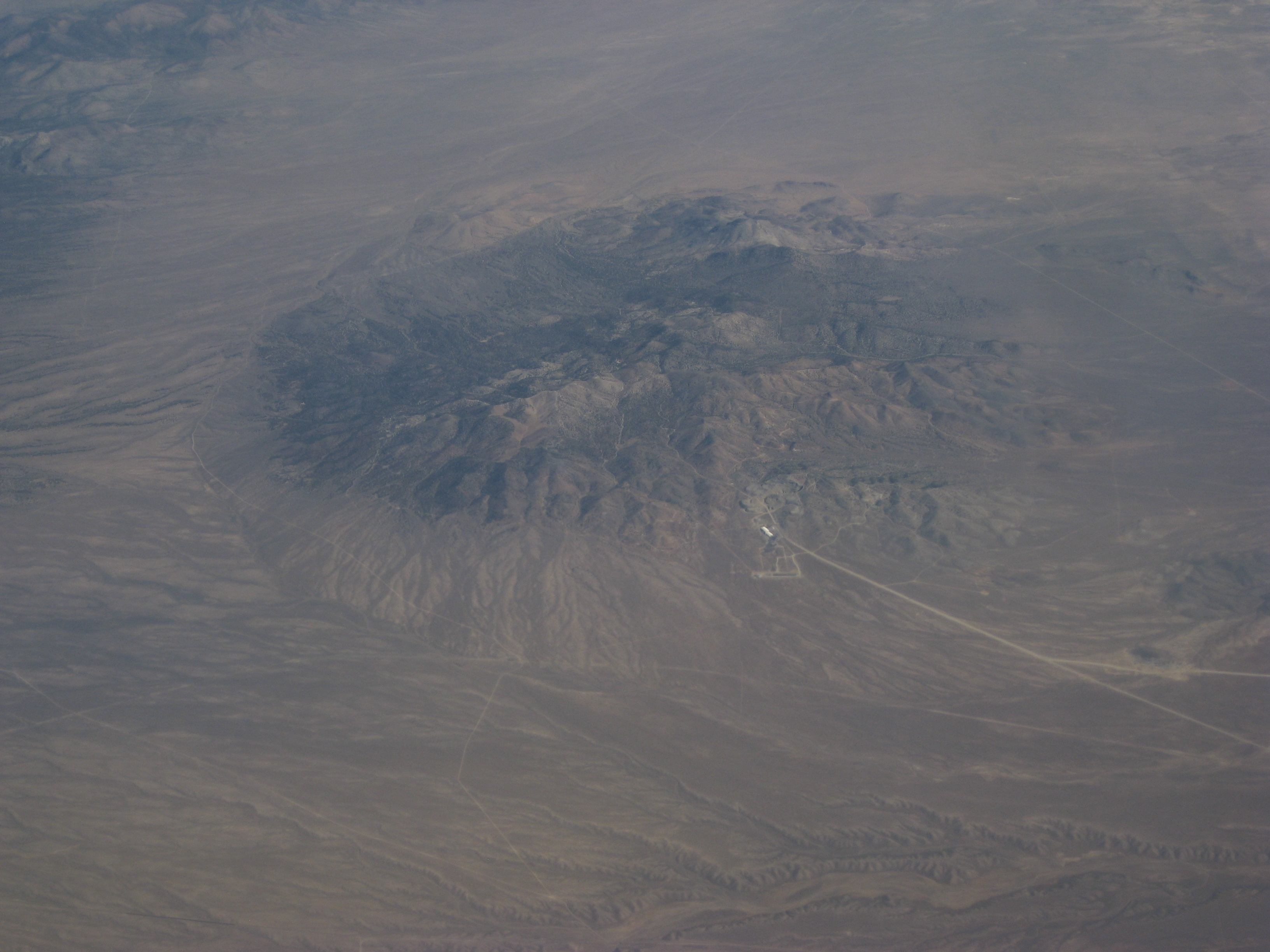 2009:08:26 09:22:46 i090909 564